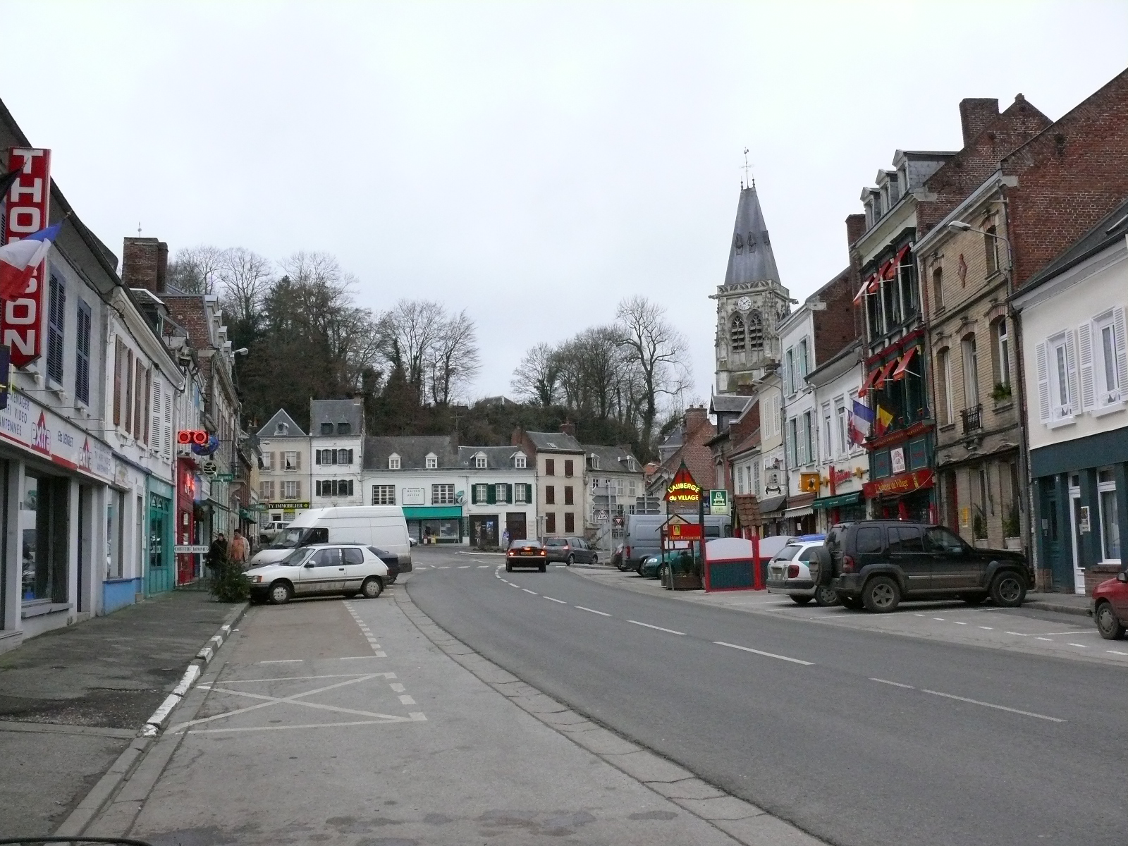 La Place du bourg de Conty (Place du général-de-Gaulle). Au fond, la butte féodale.